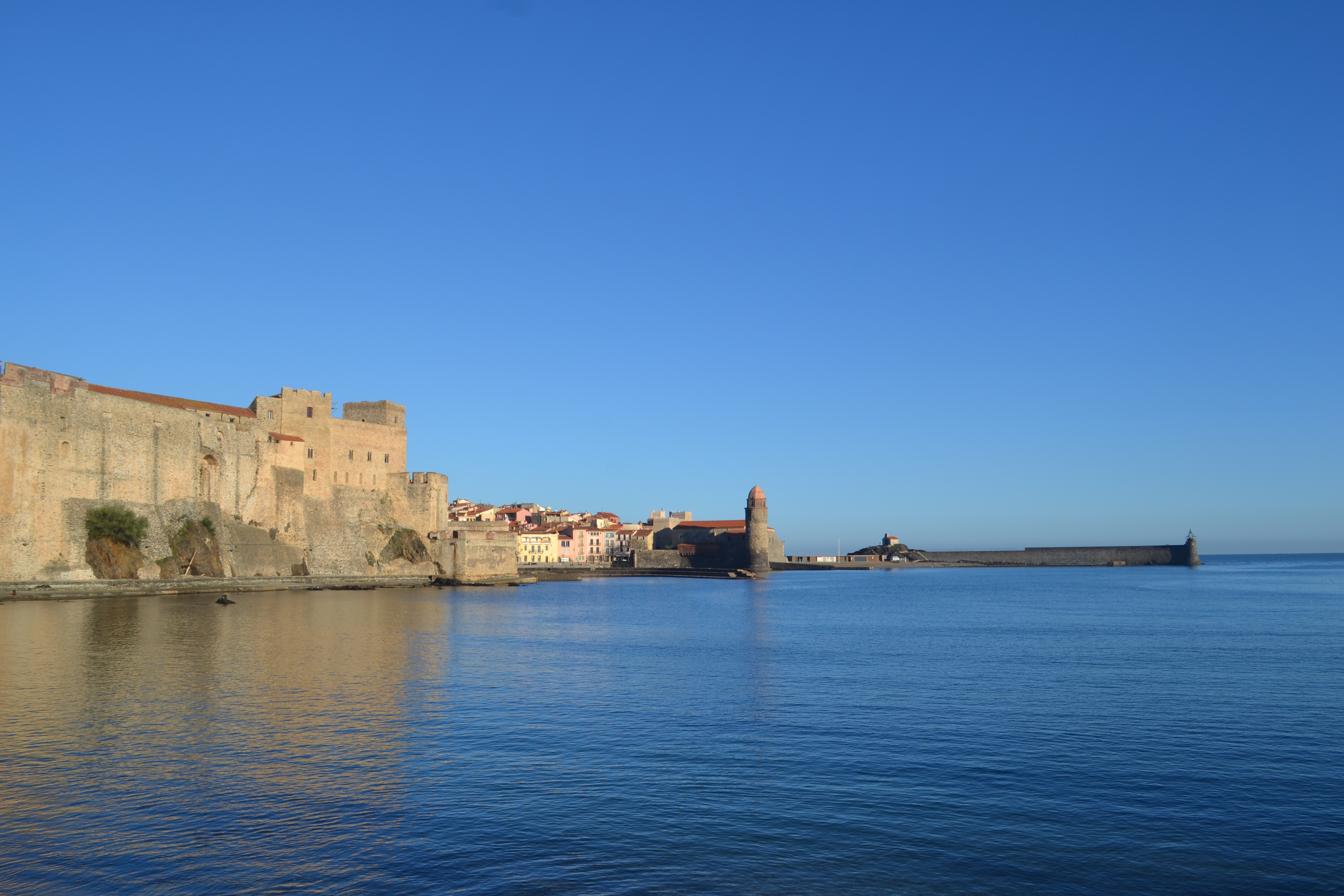 Λιμάνι, Κολιούρ